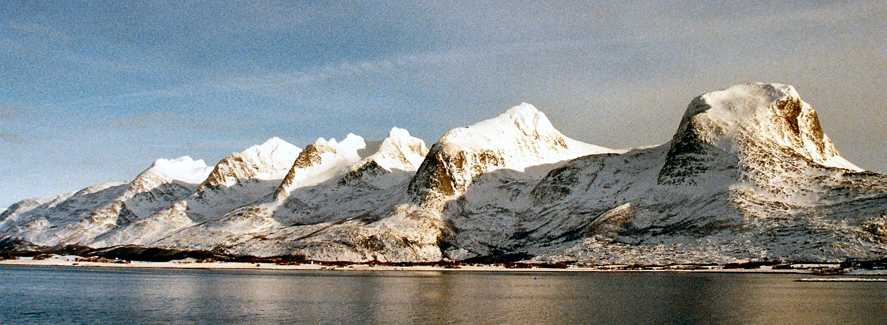 De Syv Sostre near Sandnesjoen (Norway)